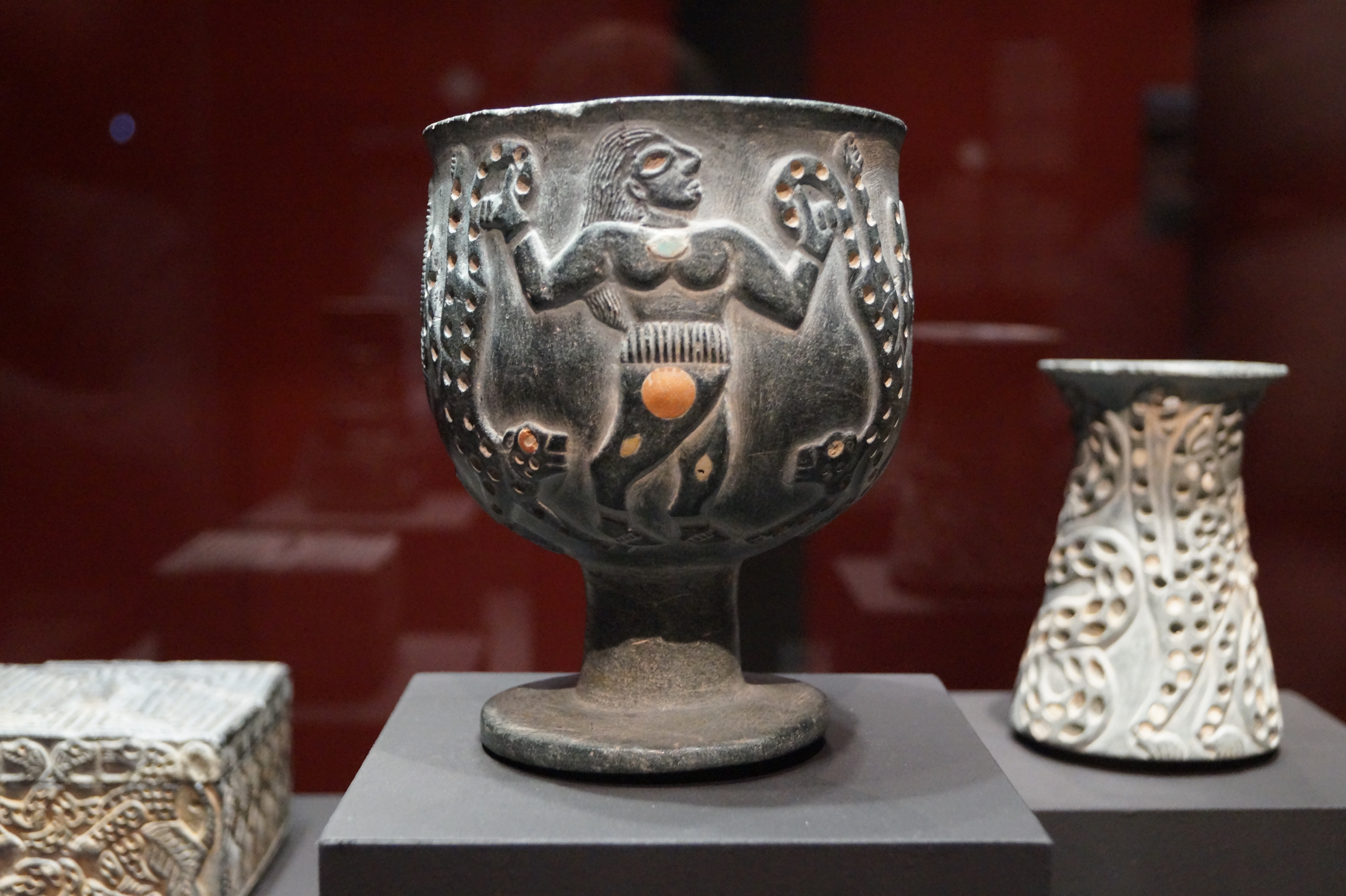 Die Ausstellung "Iran. Frühe Kulturen zwischen Wasser und Wüste" in der Bonner Kunst- und Ausstellungshalle der Bundesrepublik Deutschland zeigte vom 13. April bis 20. August 2017 Kunstgegenstände der iranischen Kulturen der Frühzeit, vom 7. bis ins 1. Jahrtausend v. Chr., und gab einen Einblick in auf eine in Europa wenig bekannte Bildwelt aus einem über Jahrzehnte verschlossenen Land.